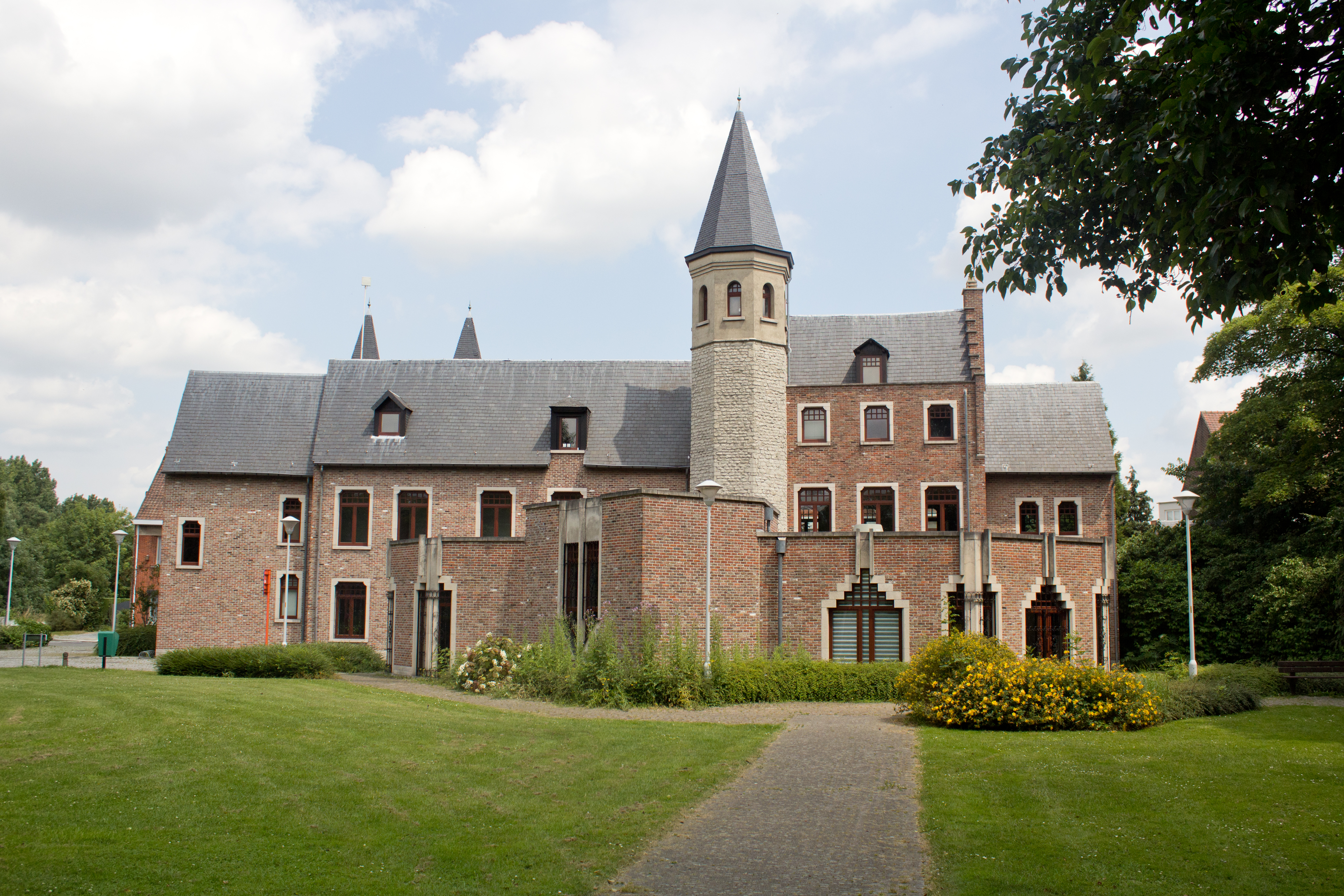 Voormalig kasteel Pellenberg te Machelen